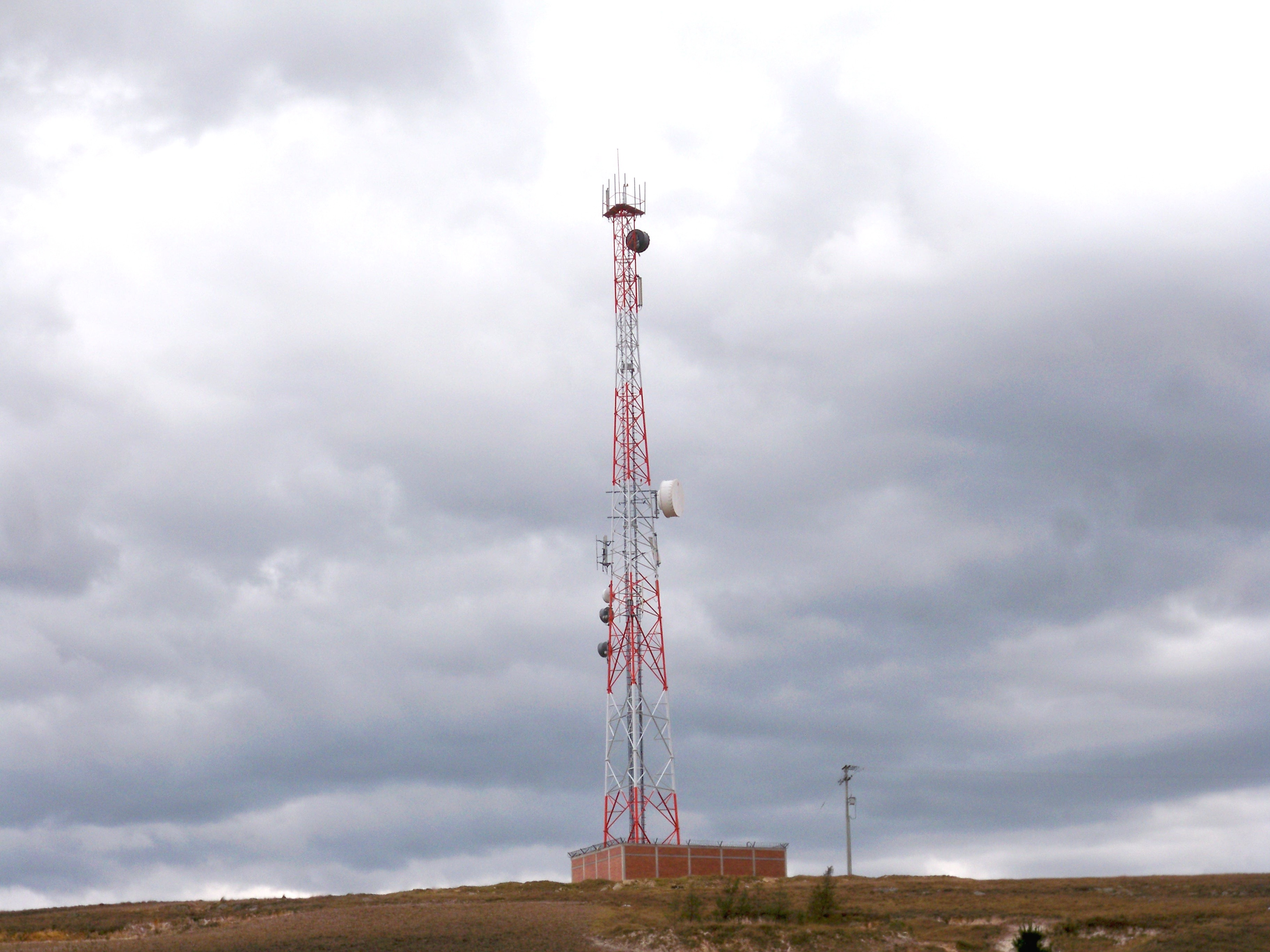 Antena ubicada en Oicatá